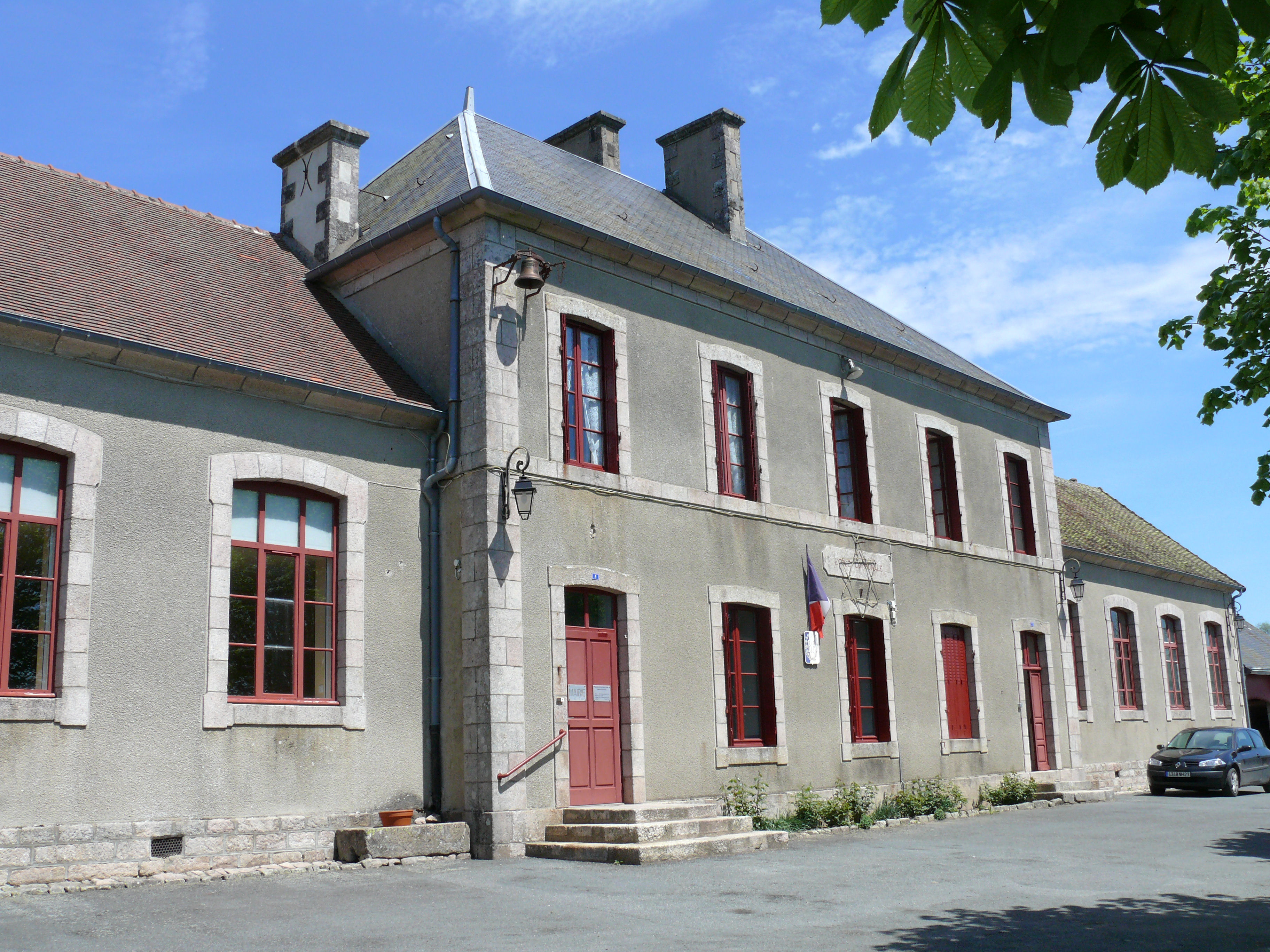 Toulx-Sainte-Croix - Mairie, école